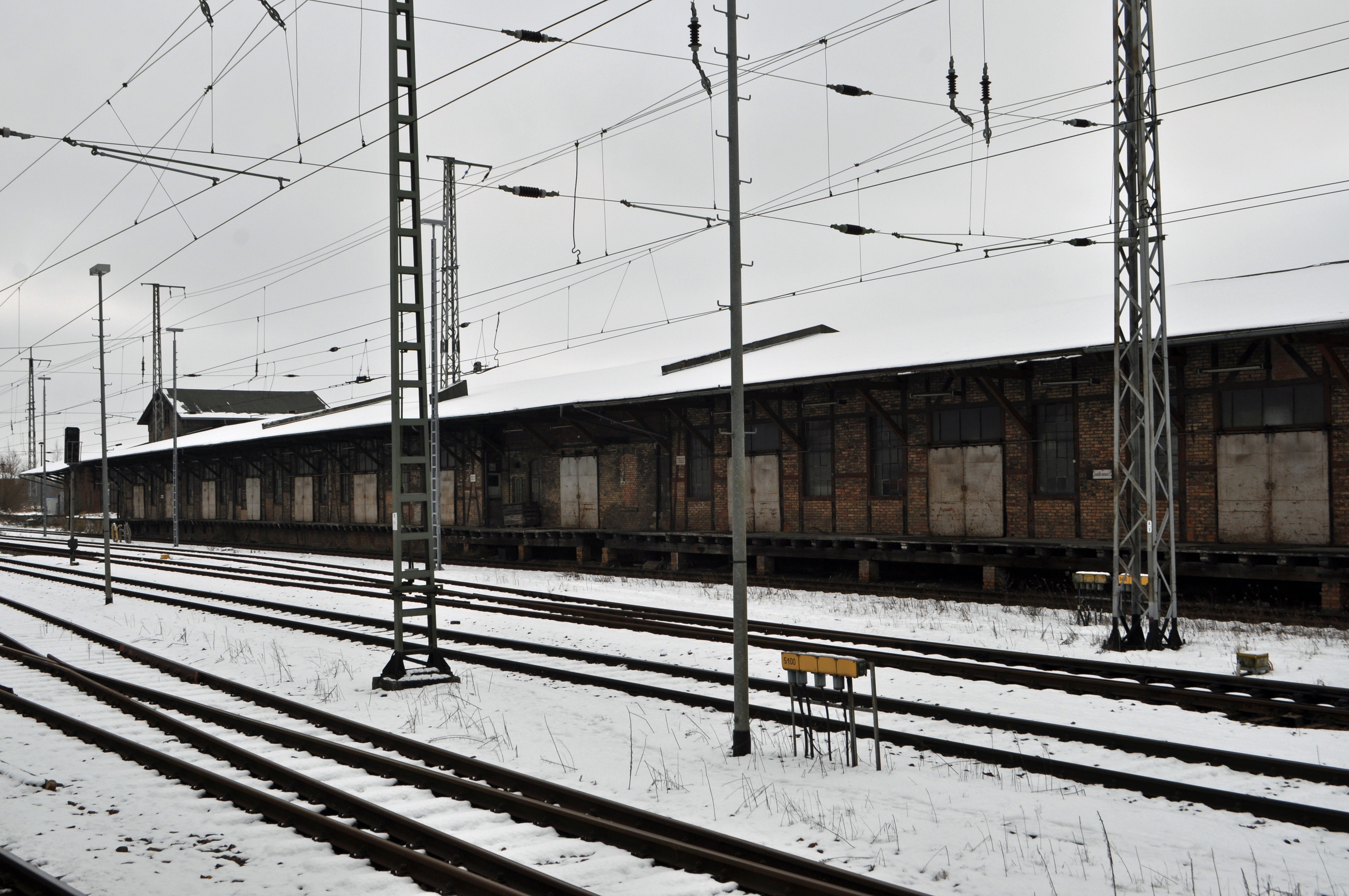 Stralsund, Hauptbahnhof (2013-02-13), by Klugschnacker in Wikipedia (2)